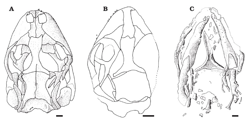 Comparison of skulls in Eichstaettisaurus. A. Eichstaettisaurus schroederi, BSPHM 1937 I 1, Solnhofen, Germany. B. Eichstaettisaurus sp., IEI LP−3400, Montsec, Catalonia, Spain. C. Eichstaettisaurus gouldi sp. nov., MPN 19457, Pietraroia, Italy. A, B, dorsal views, C, ventral view. Scale bars 1 mm.